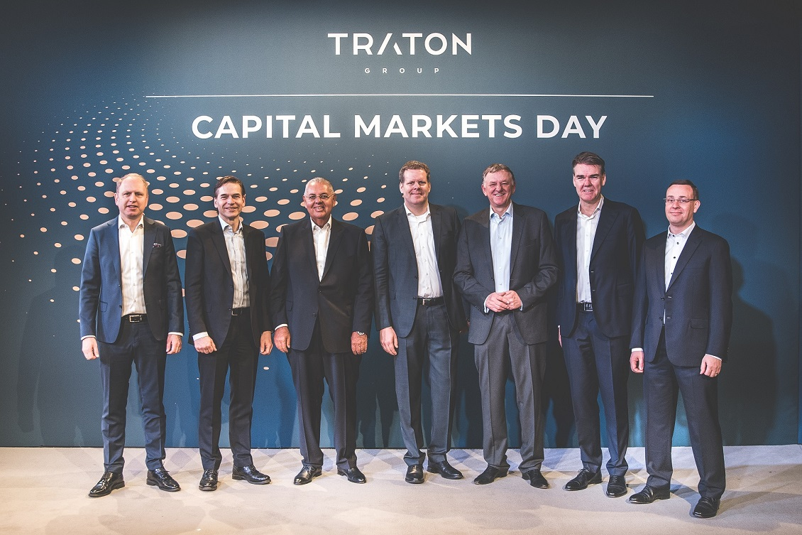 Von links nach rechts: Henrik Henriksson, Christian Levin, Antonio Roberto Cortes, Dr. Carsten Intra, Andreas Renschler, Joachim Drees, Christian Schulz